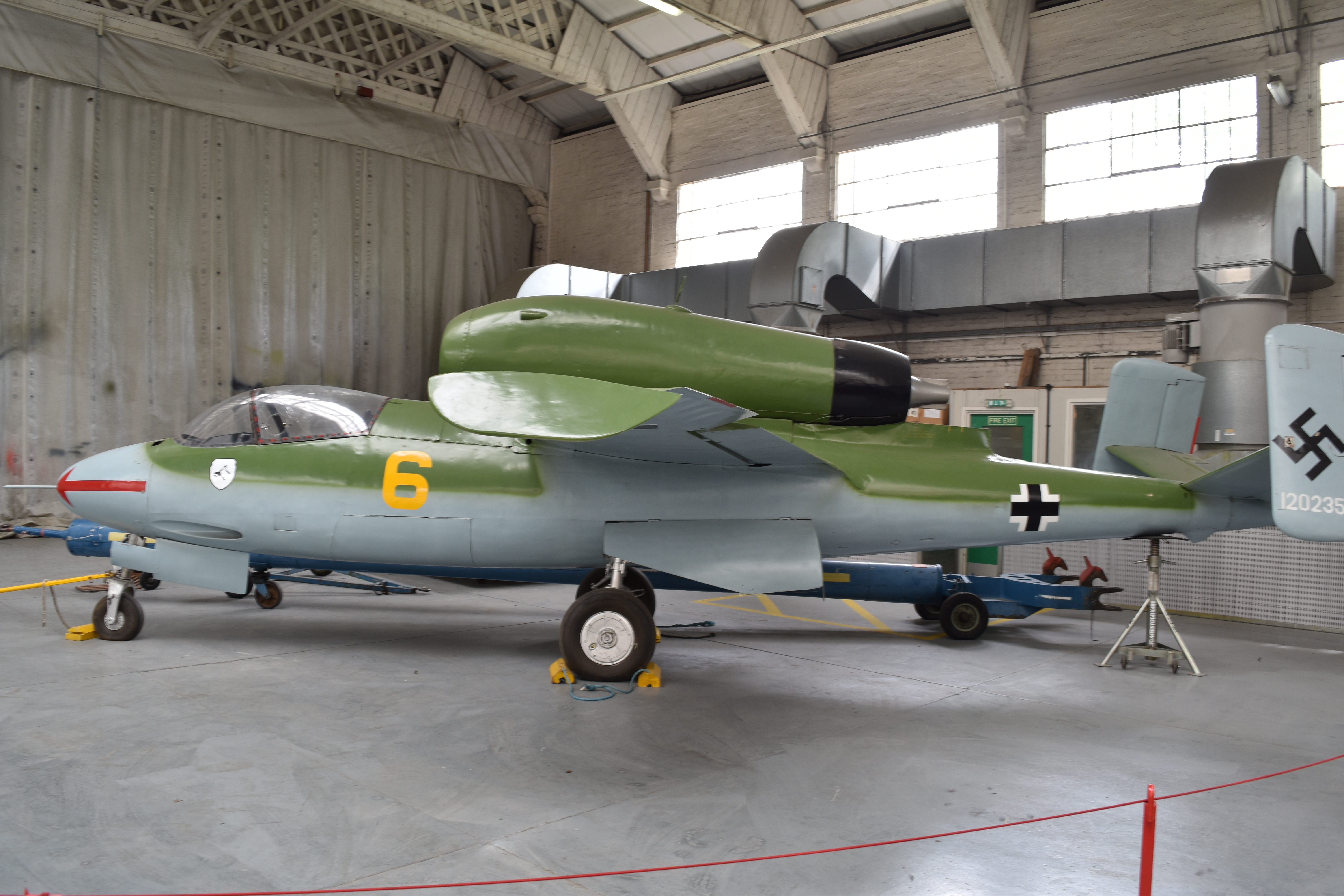 Изтребител Heinkel He-162 Salamander от колекцията на Имперския военен музей, филиал Дъксфорд, Великобритания.